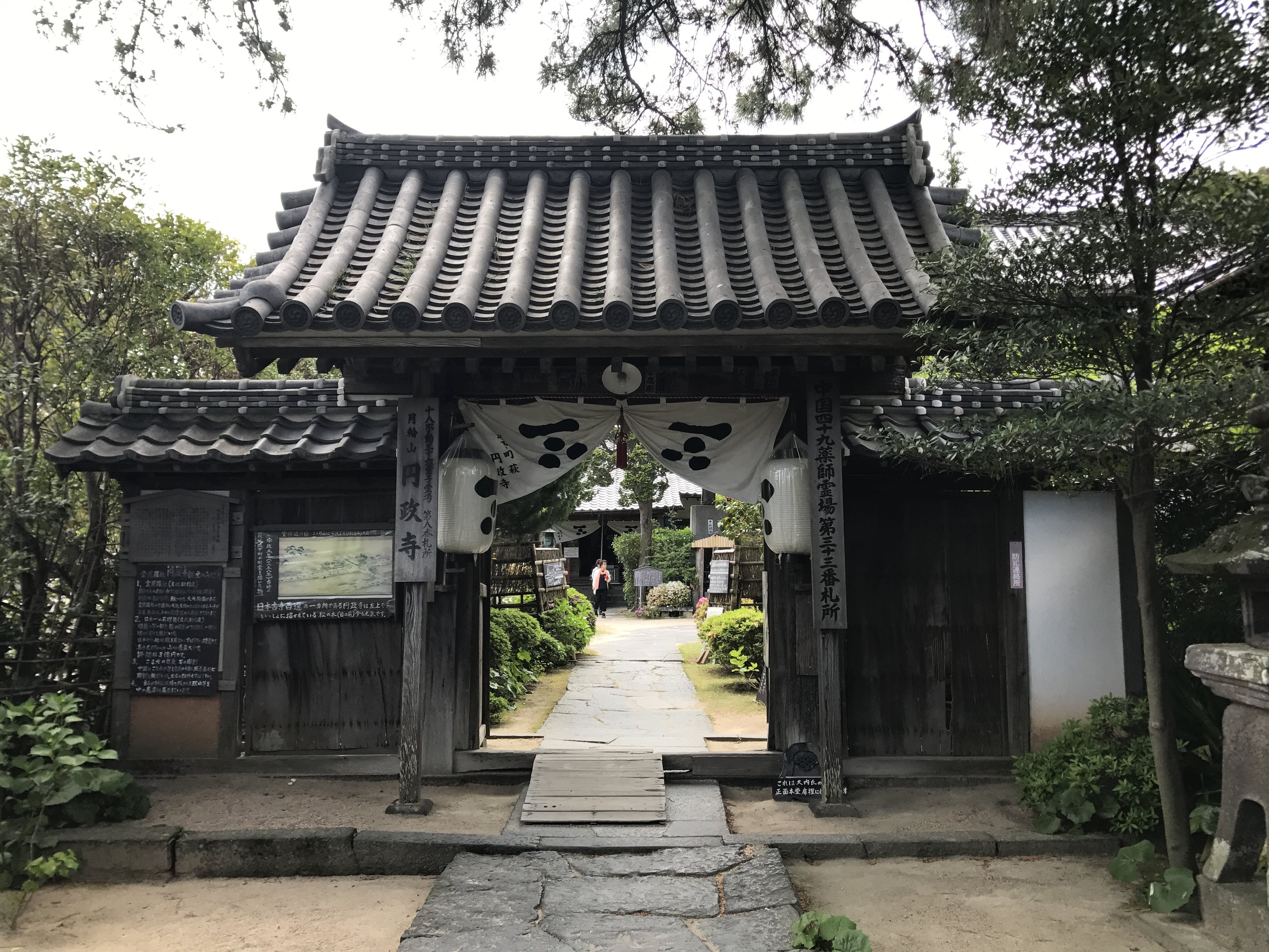 円政寺の山門